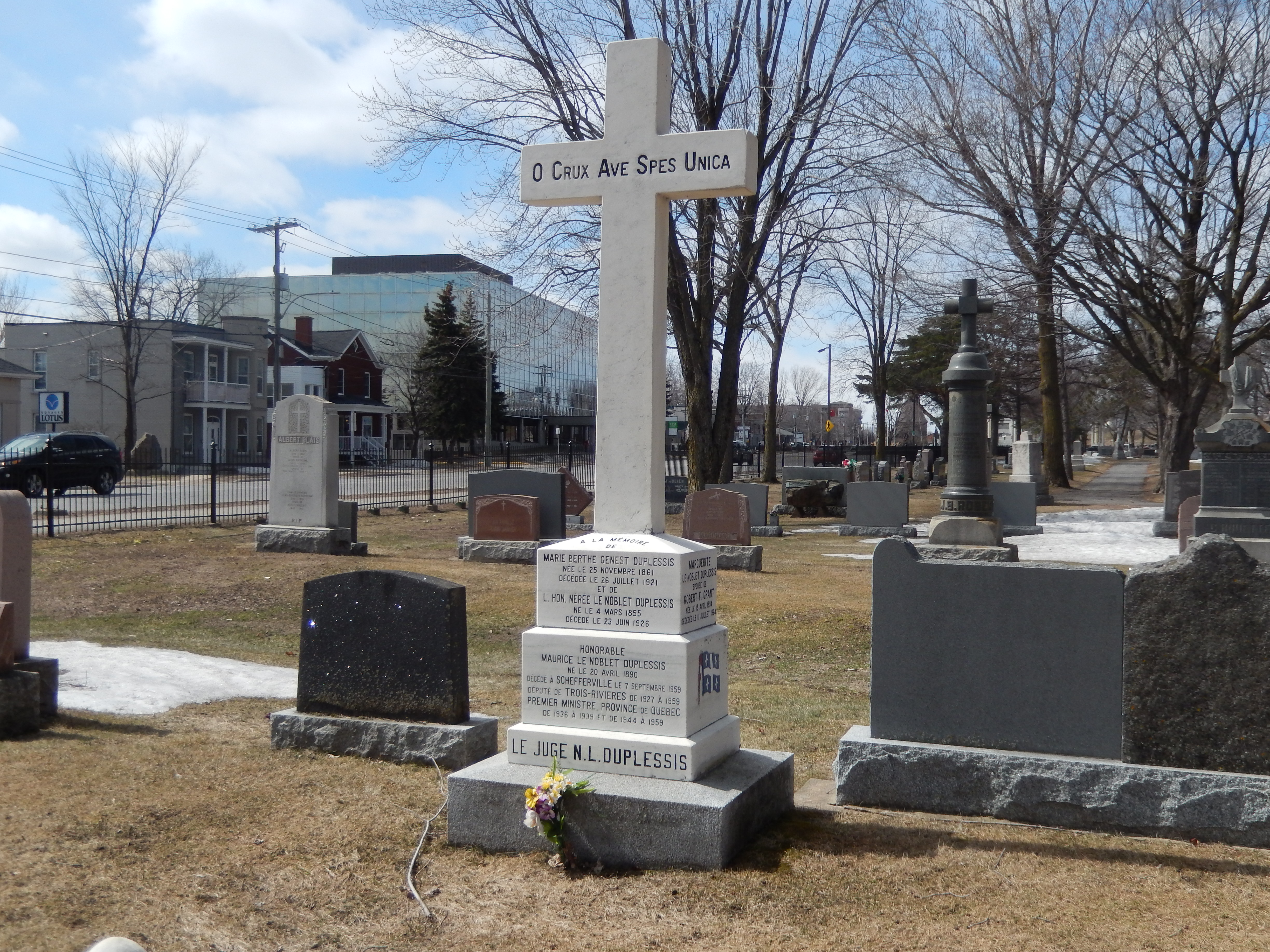 Monument funéraire de Maurice Le Noblet Duplessis dans le cimetière Saint-Louis à Trois-Rivières